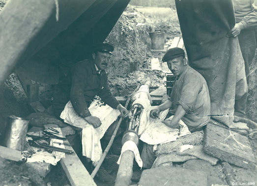 To montører i arbeidstelt. Montering av 30000 V AEG muffe for høyspentkabel, Skøyen, Oslo.1922